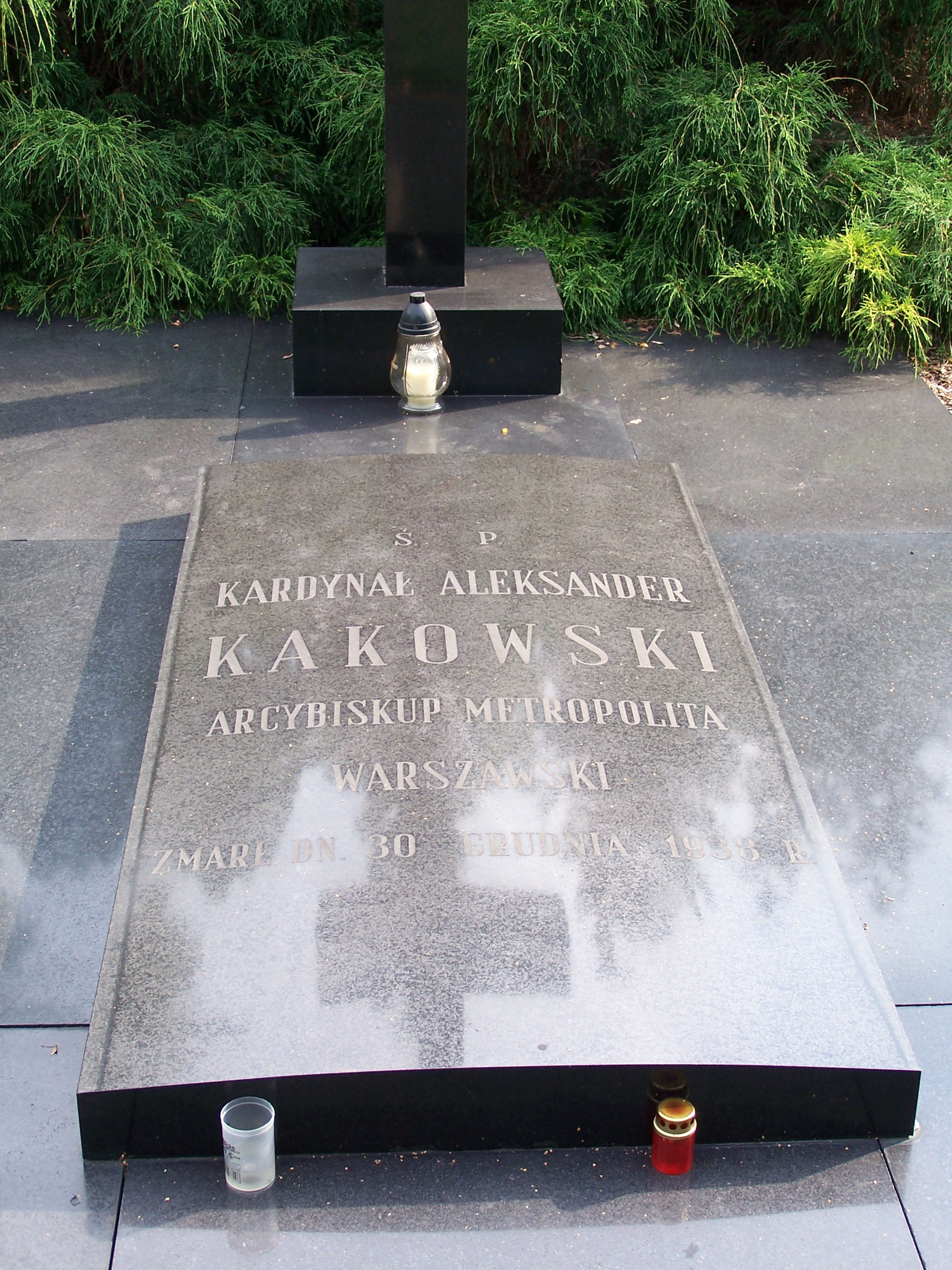 Grave of Aleksander Kakowski at Bródno Cemetery in Warsaw, Poland